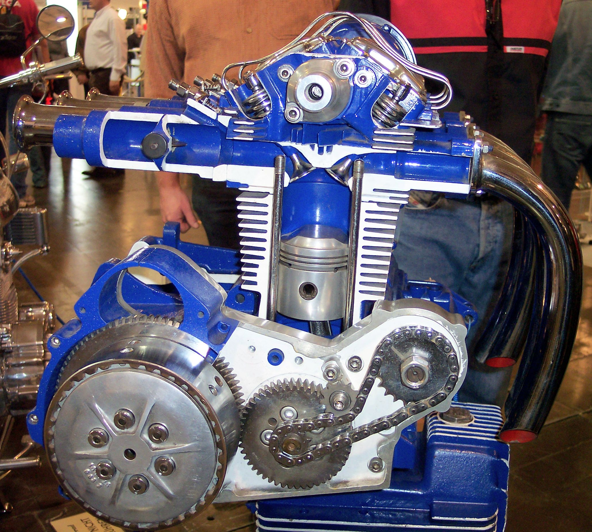 Münch (=NSU) Engine cutout